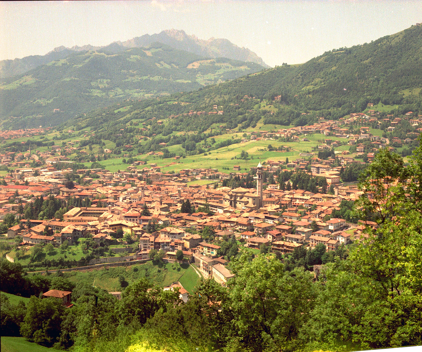 Gandino